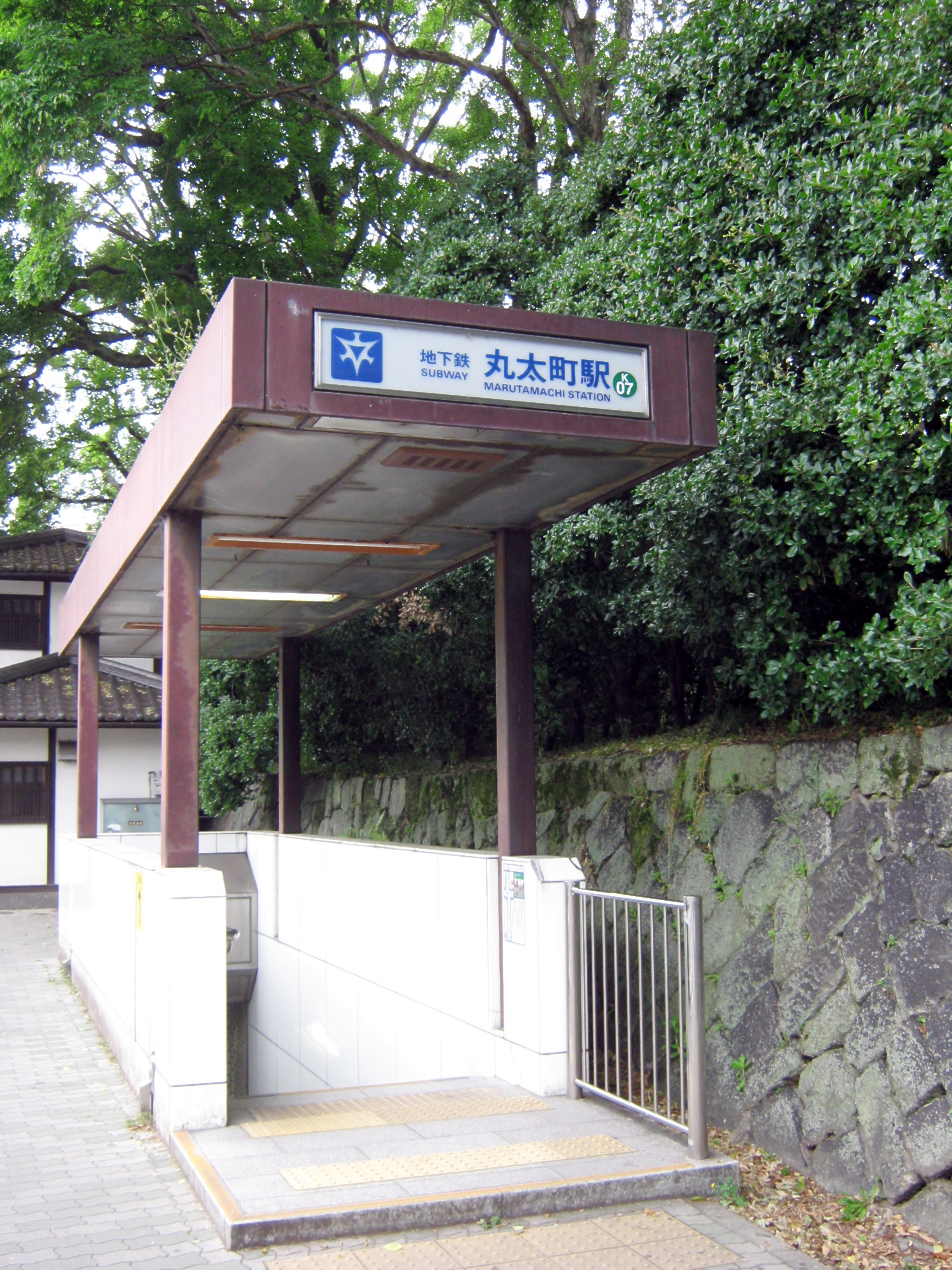 京都市営地下鉄烏丸線・丸太町駅